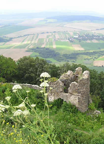 Kategória:Obrázky budov